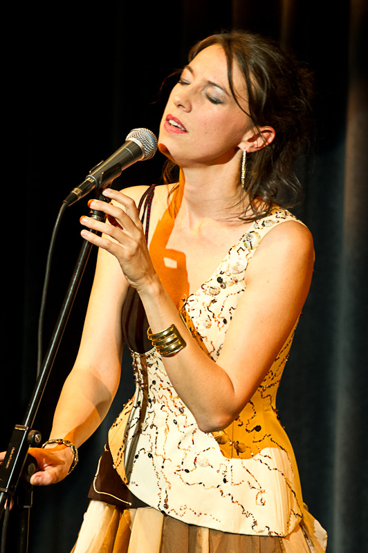 Gwennyn en concert à l'Auditorium de Douarnenez le 02 juin 2012.